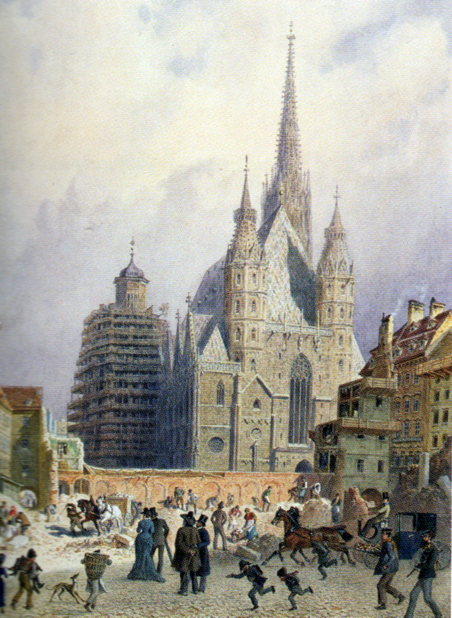 Demolierung der Brandstätte in Wien, Aquarell von Carl Goebel, 1875